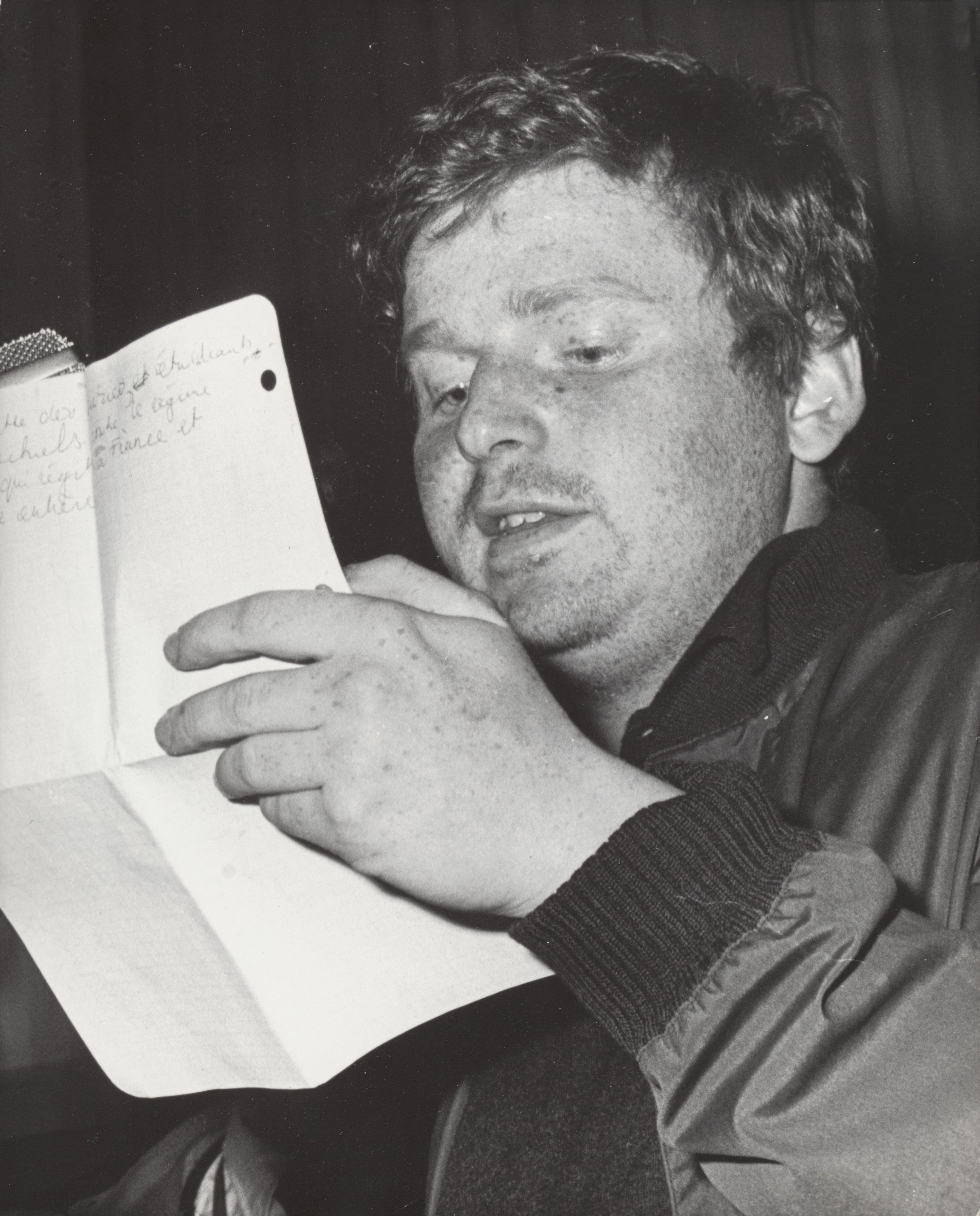 Collectie / Archief : Fotocollectie Elsevier Reportage / Serie : [ onbekend ] Beschrijving : studenten, redevoeringen, Bendit Daniel Cohn Datum : 23 mei 1968 Locatie : Amsterdam, Parijs Trefwoorden : redevoeringen, studenten Persoonsnaam : Bendit Daniel Cohn Fotograaf : Nijs, Jac. de / Anefo Auteursrechthebbende : Nationaal Archief Materiaalsoort : Foto (zwart/wit) Nummer archiefinventaris : bekijk toegang 2.24.05.02 Bestanddeelnummer : 045-0334